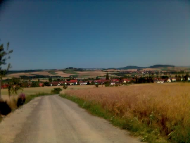 Blick auf Sudheim im Sommer.